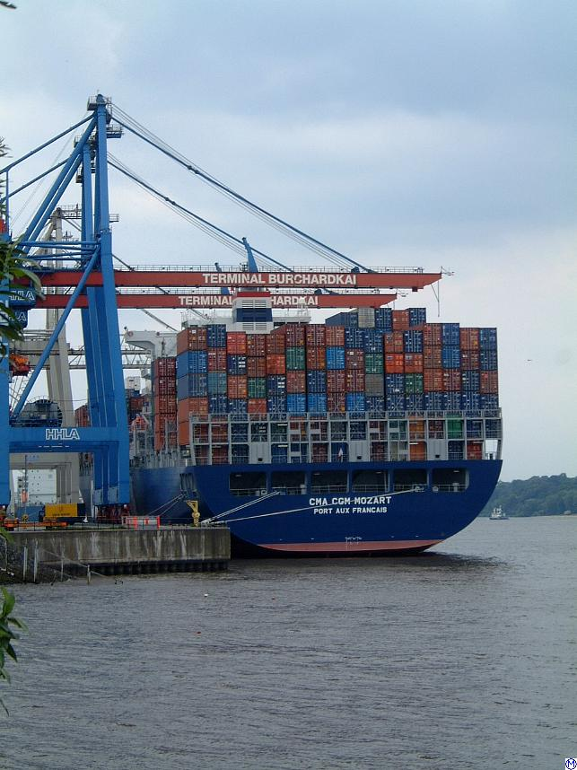 Heckpartie Containerschiff CGM CMA Mozart am Burchardkai in Hamburg